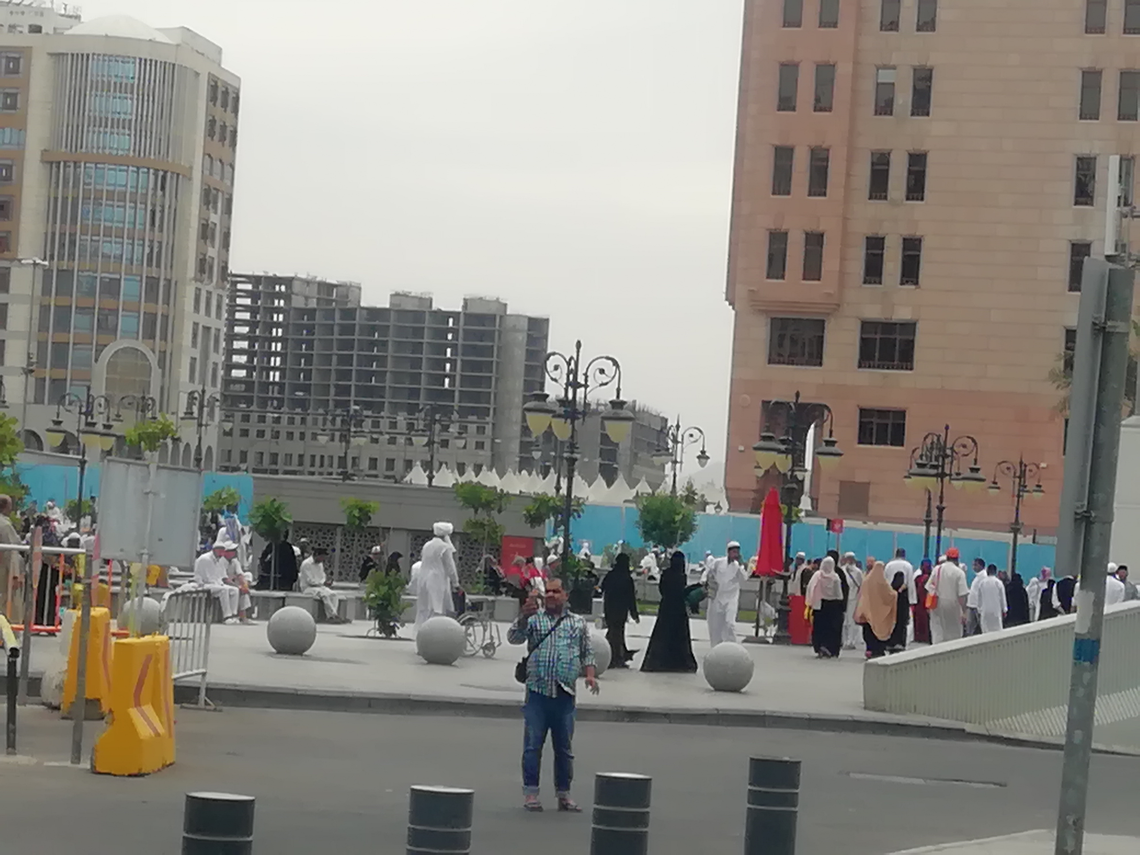 al-Madinah al-Munawarah Madina Market, & Eid Musalla. Behind Madina market tents is Saqifet Bani Saaeda.